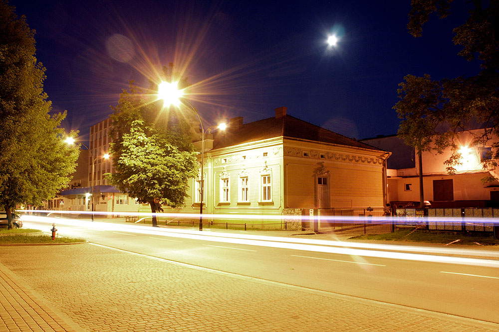 Tarnobrzeg, ul. Sokola.